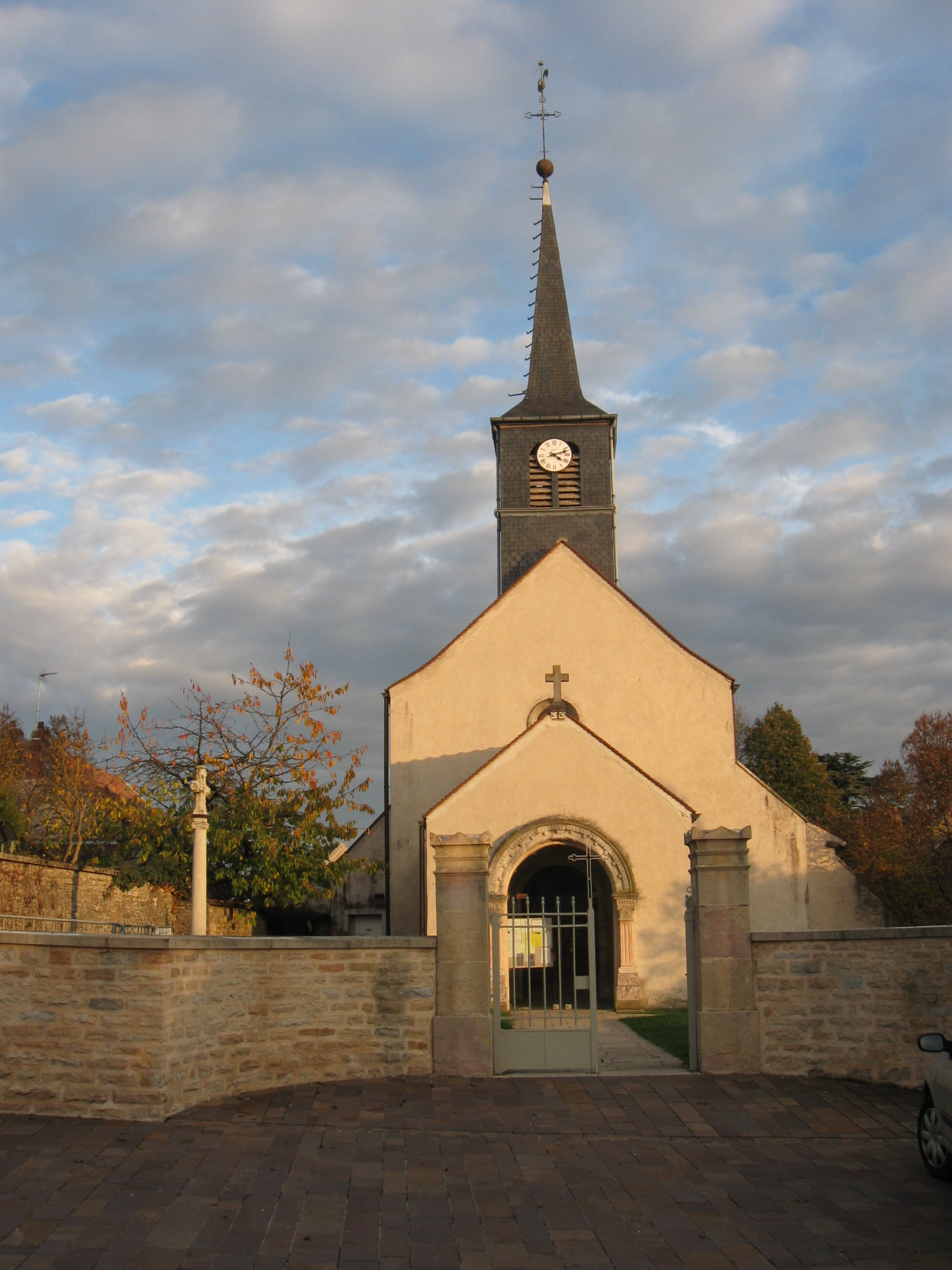 Eglise Saint Apollinaire